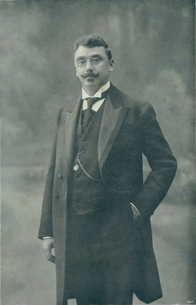 Снимка на Георги Таков Пеев като депутат от Трънския избирателен район.